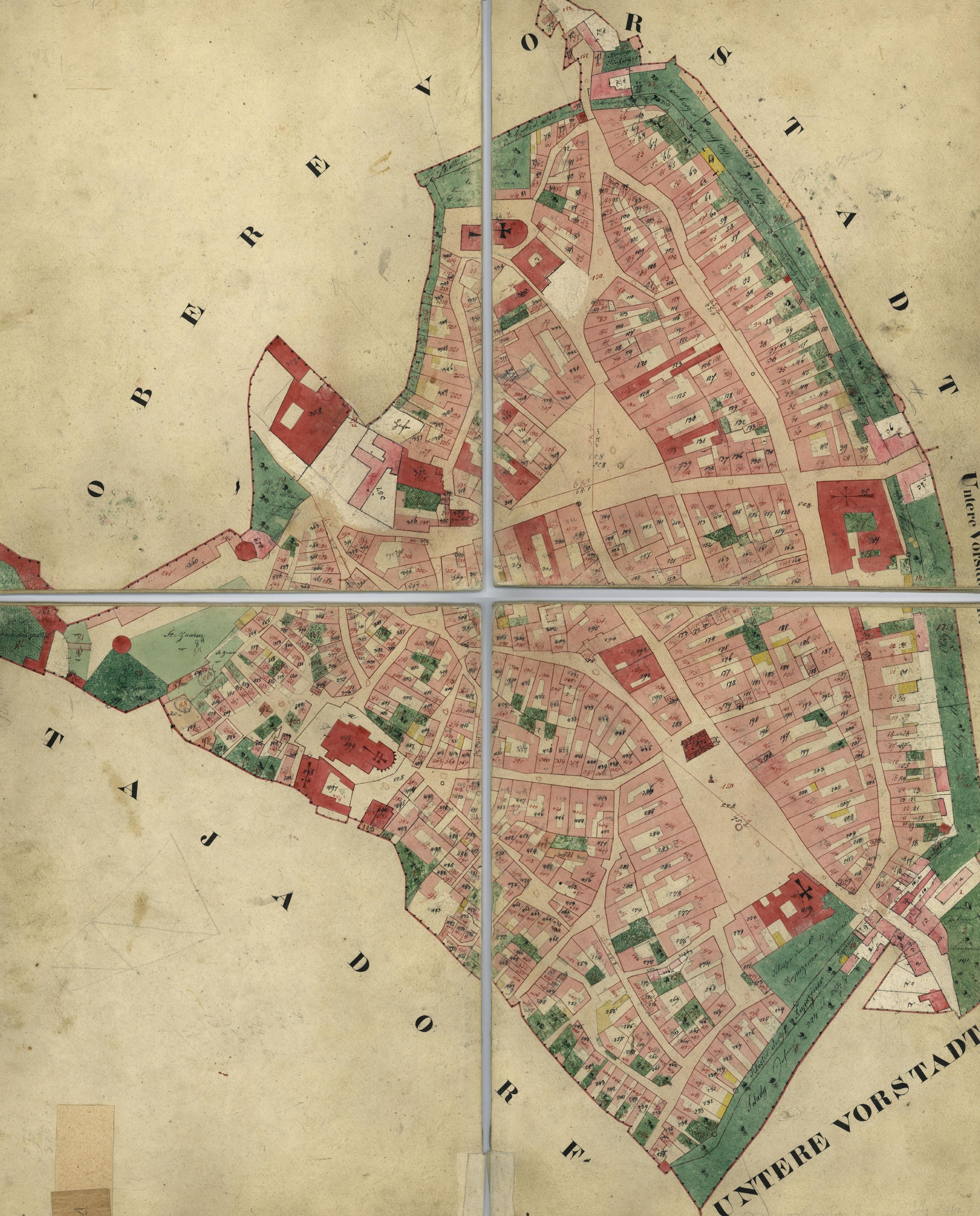 Indikationsskizzen: Znojmo